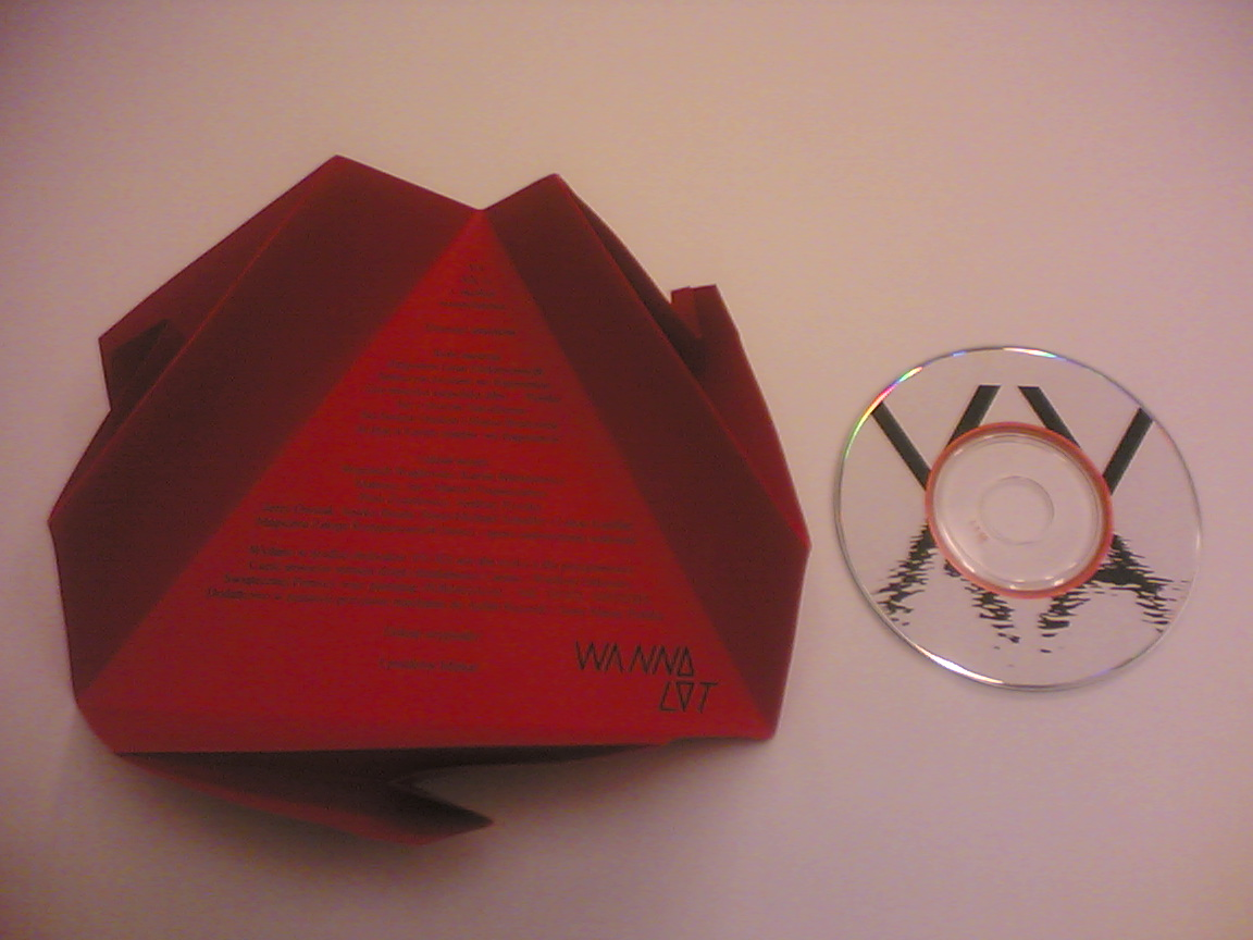 Otwarta płytka wannolotowa XX 1/2